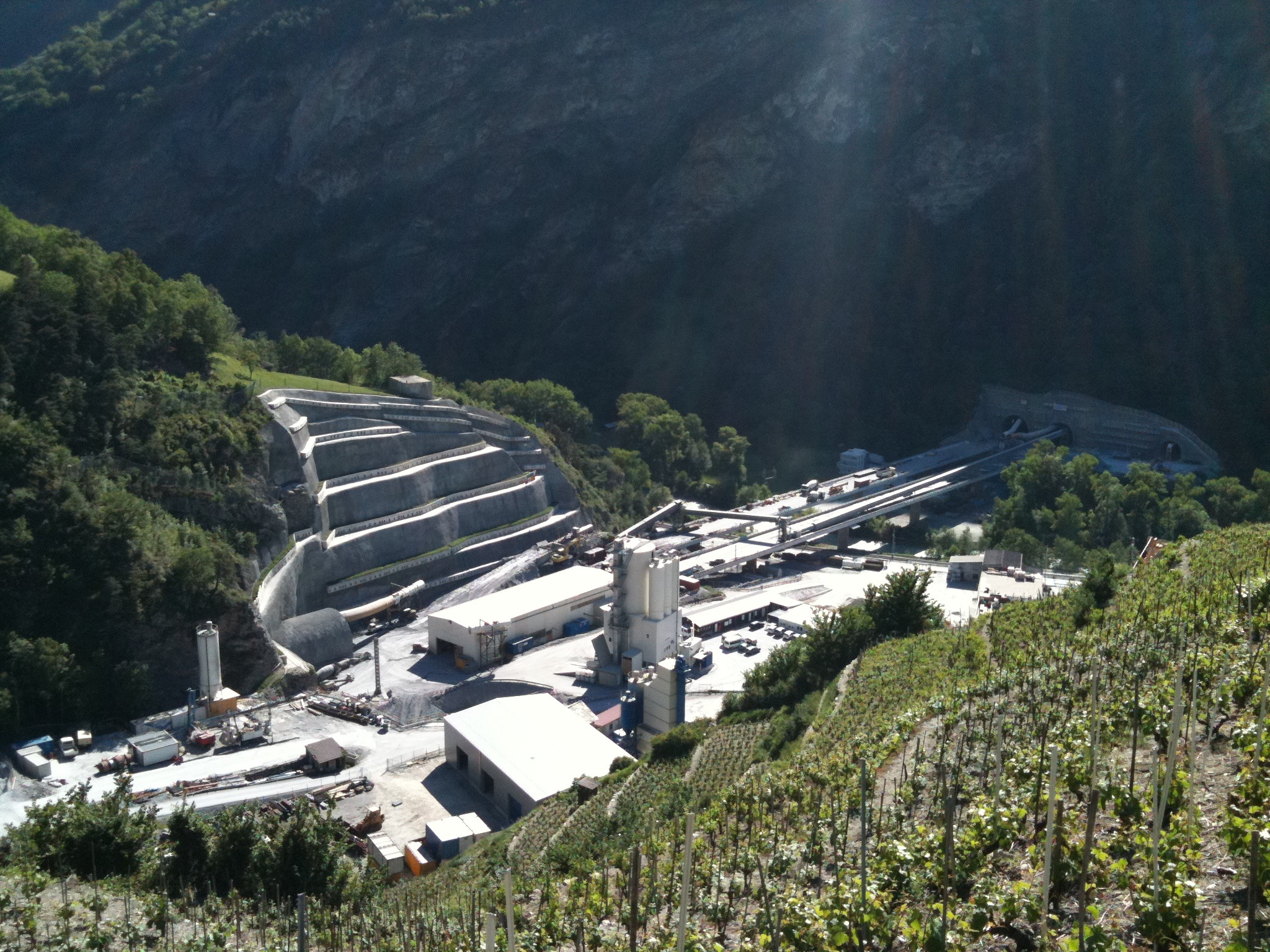 Grossbaustelle der A9 im Oberwallis - Umfahrung Visp (Mai 2010). Blick Richtung Süden. Links das Westportal des Eyholztunnels, in der Mitte die Staldbachbrücke und Rechts das Portal des Tunnel Visp.